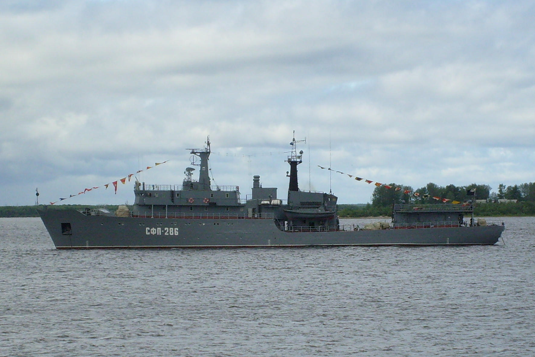 Судно контроля физических полей СФП-286, Северная Двина, Архангельск, 27 июля 2008